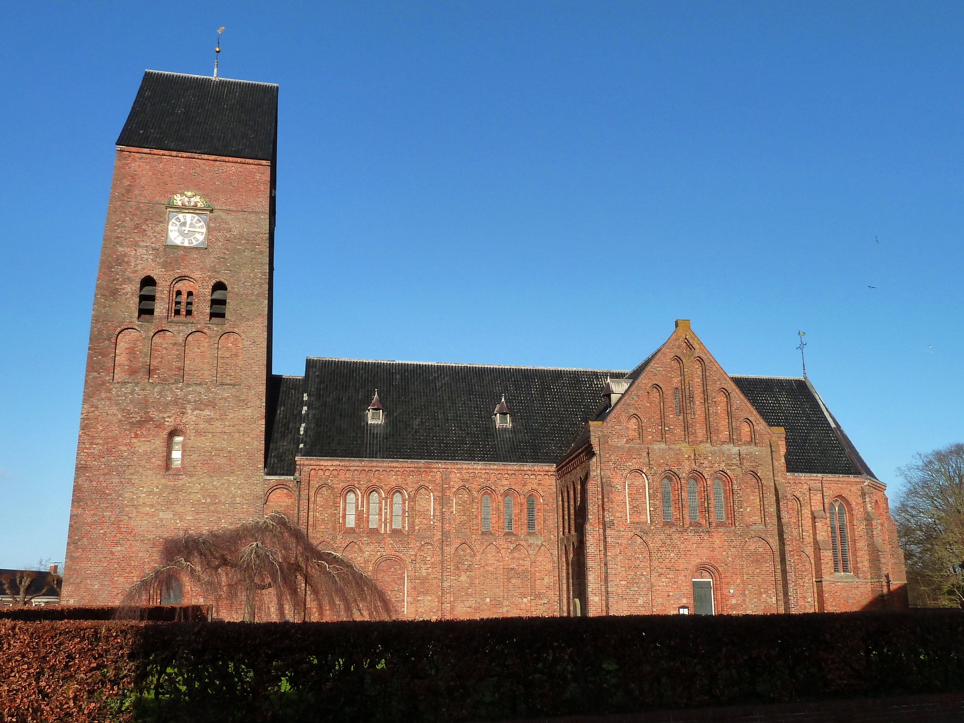 Hervormde Bartholomeuskerk van Stedum